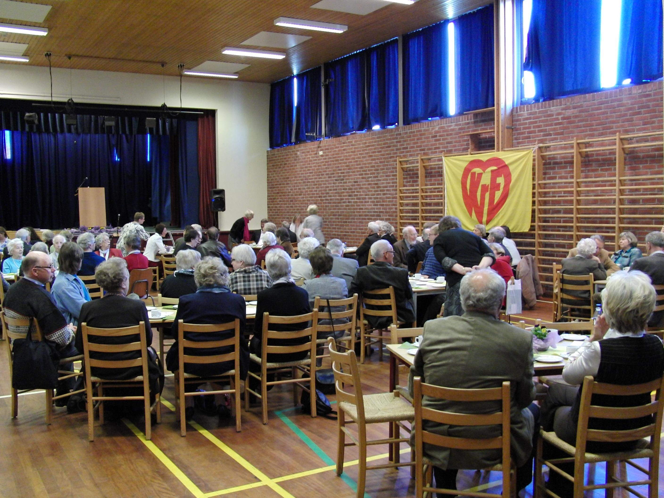 KrFs 1. mai feiring på Skjeberg Folkehøgskole i Sarpsborg kommune